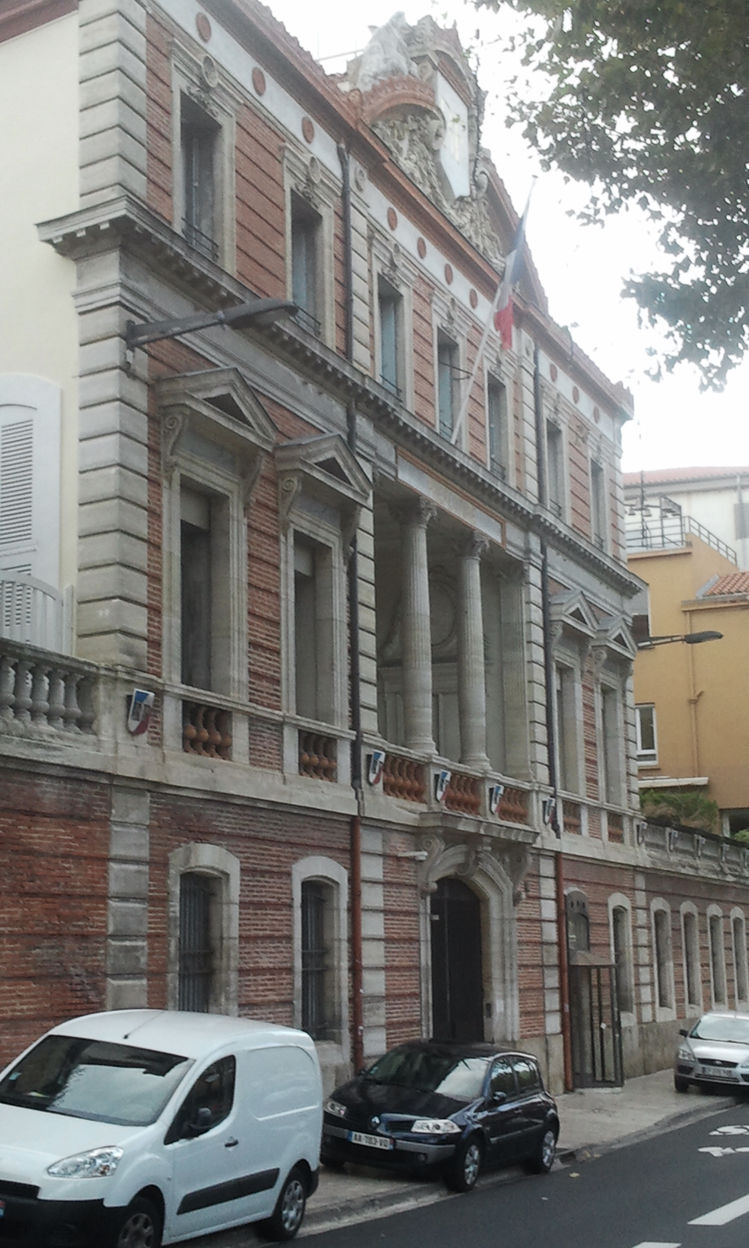 Préfecture de Perpignan côté quai Sadi Carnot